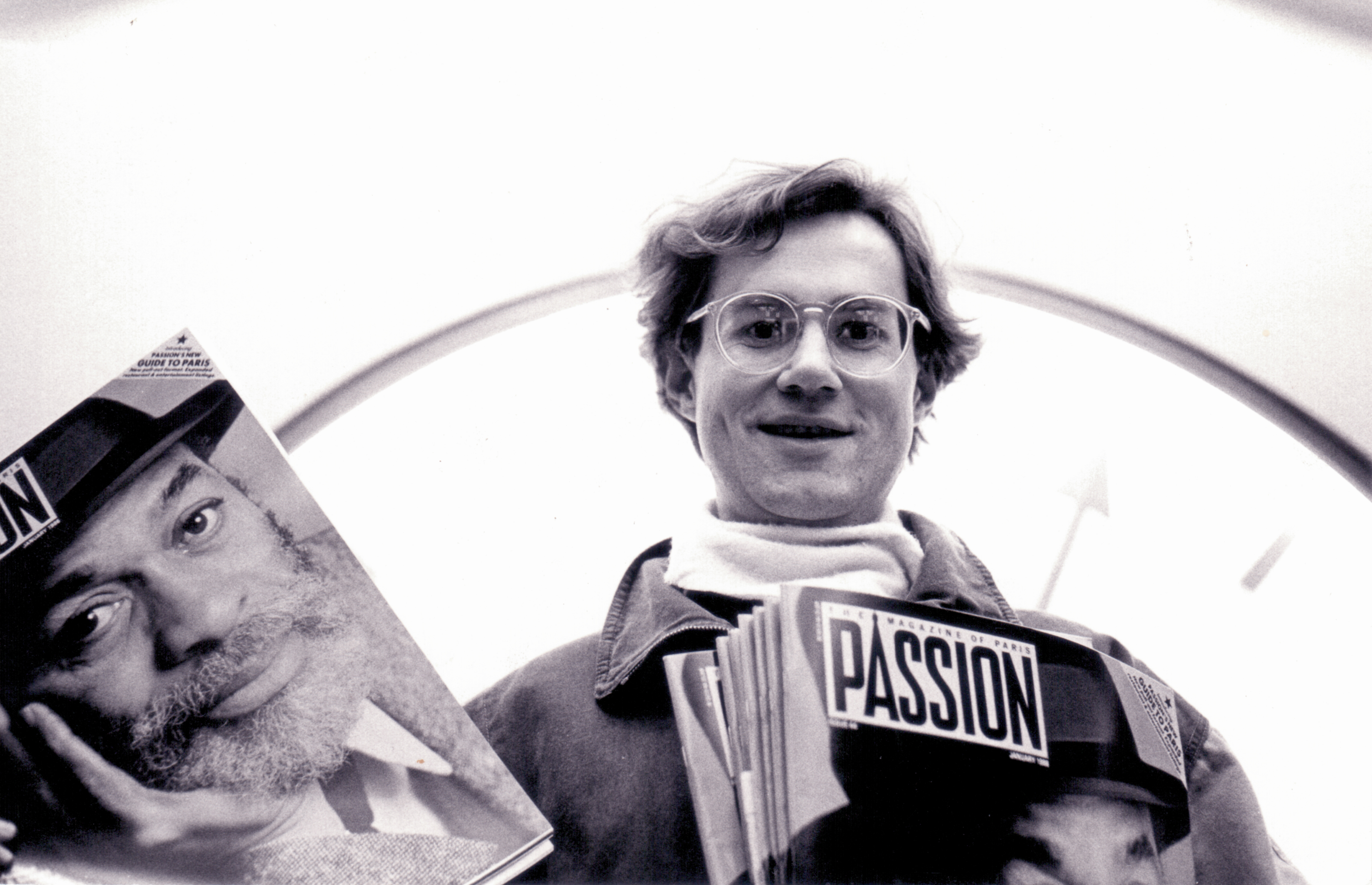 Vendeur de rue pour le magazine Paris Passion